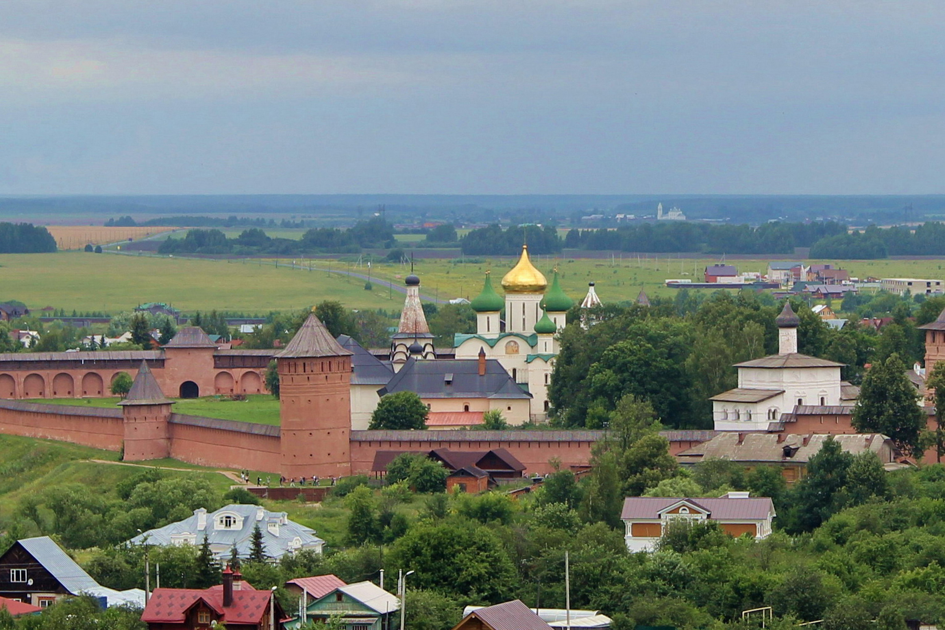 Ансамбль Спасо-Евфимиева монастыря: Ленина улица, 135, Суздаль, Суздальский район, Владимирская область